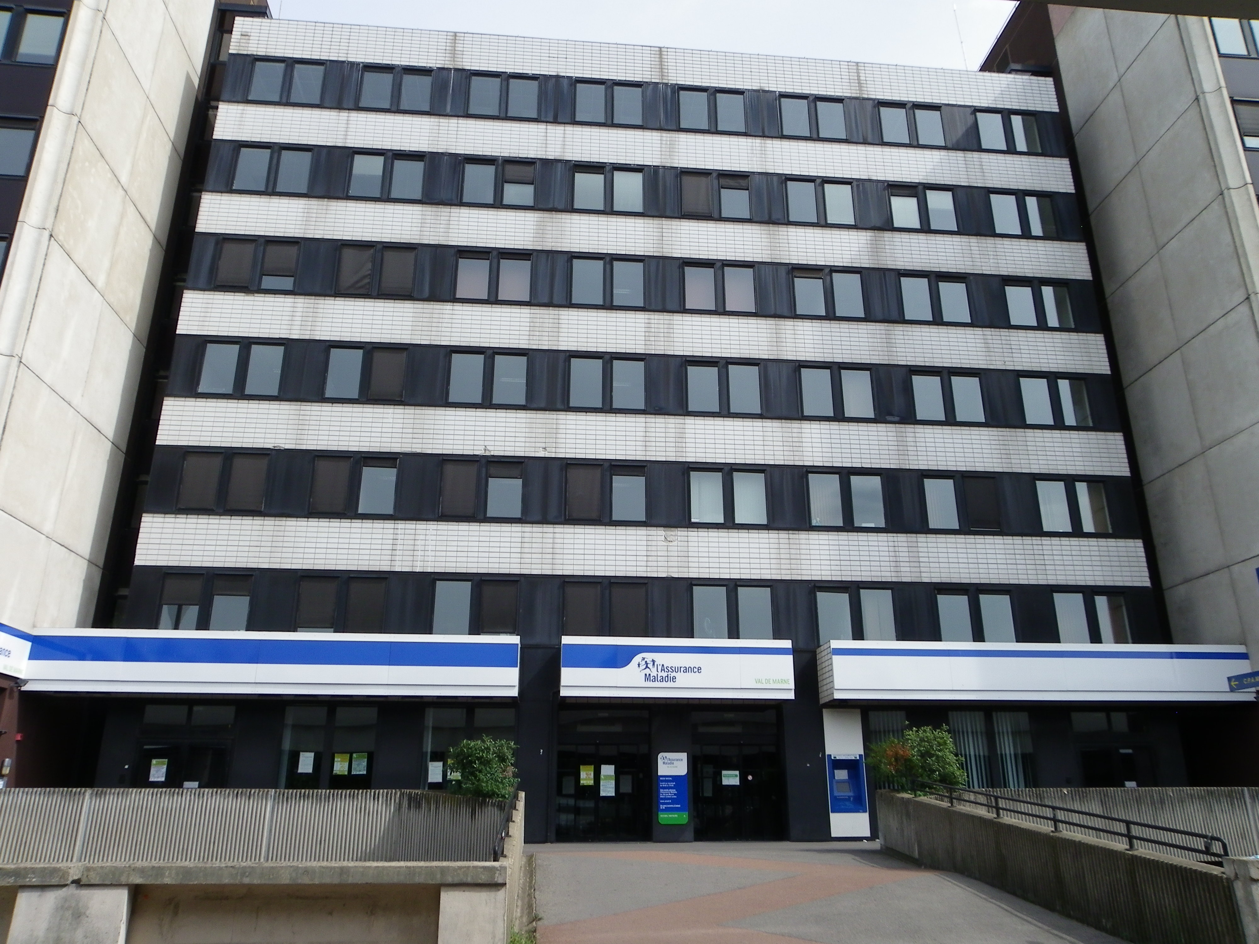 CPAM du Val-de-Marne à Créteil